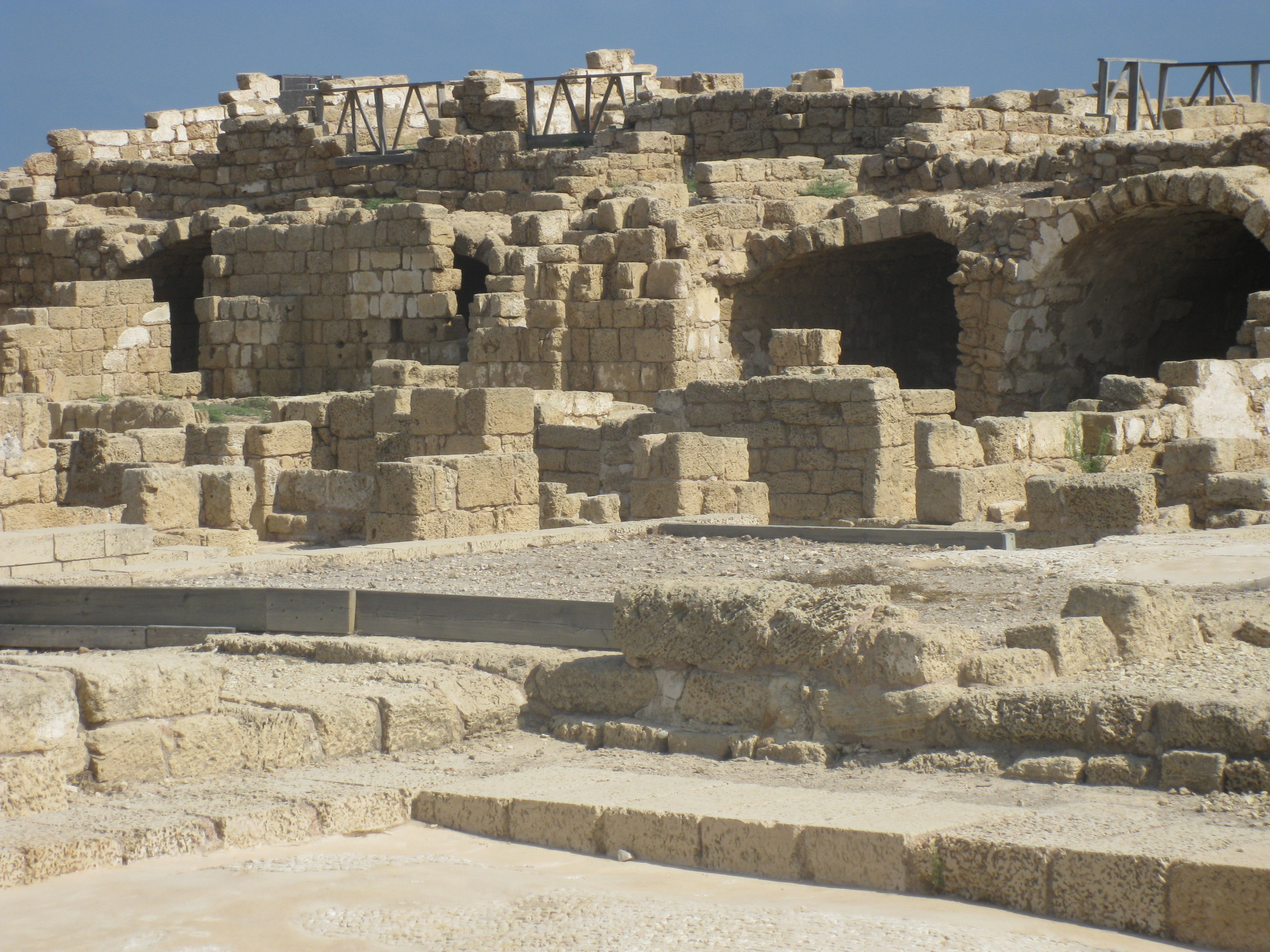 Caesarea - the warehouses קיסריה - המחסנים